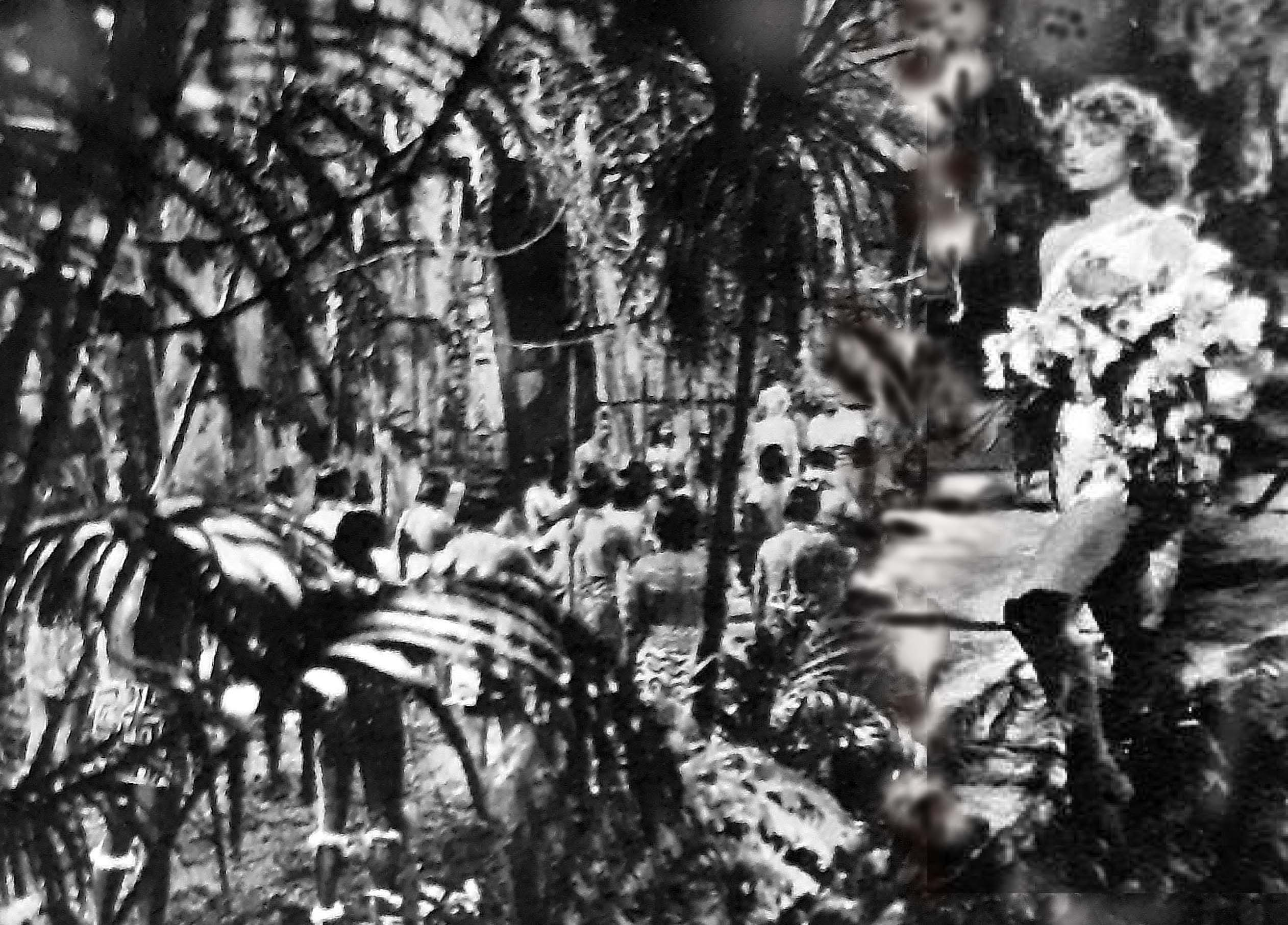 Fotogramma di Senza cielo con Isa Miranda, regia A Guarini, prod Continentalcine, Roma 1940